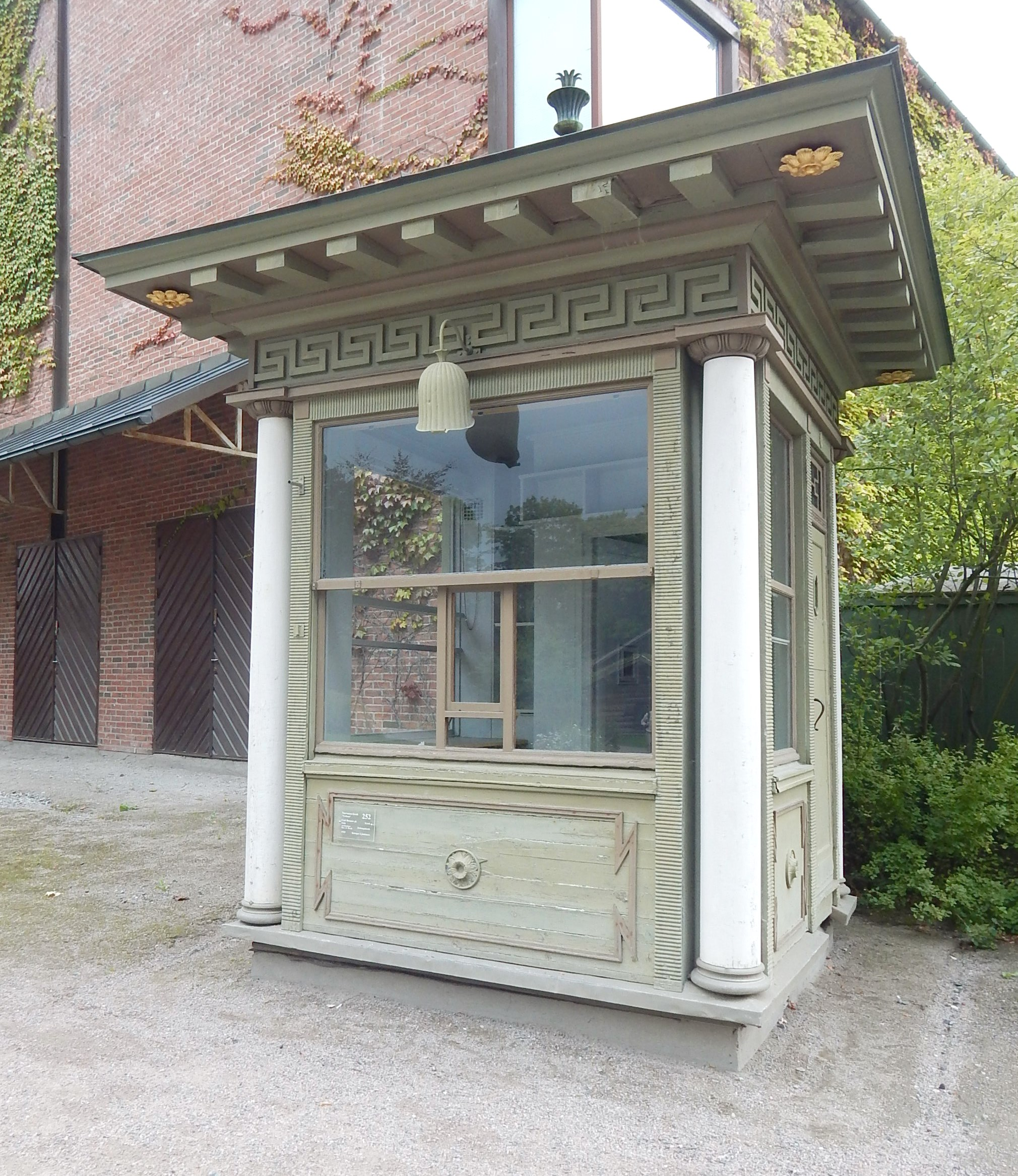 Eneste kjente gjenværende eksemplar av Narvesens Tyrihans-kiosk (ark. Carl Buch og Lorentz Harboe Ree), på Norsk Folkemuseum